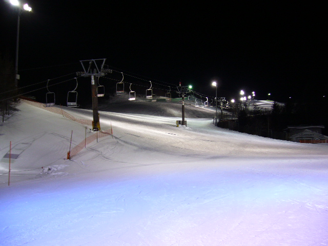 2007シーズン、ナイター営業中のいがやスキー場のゲレンデ（リフト乗り場付近よりゲレンデ上部方向）